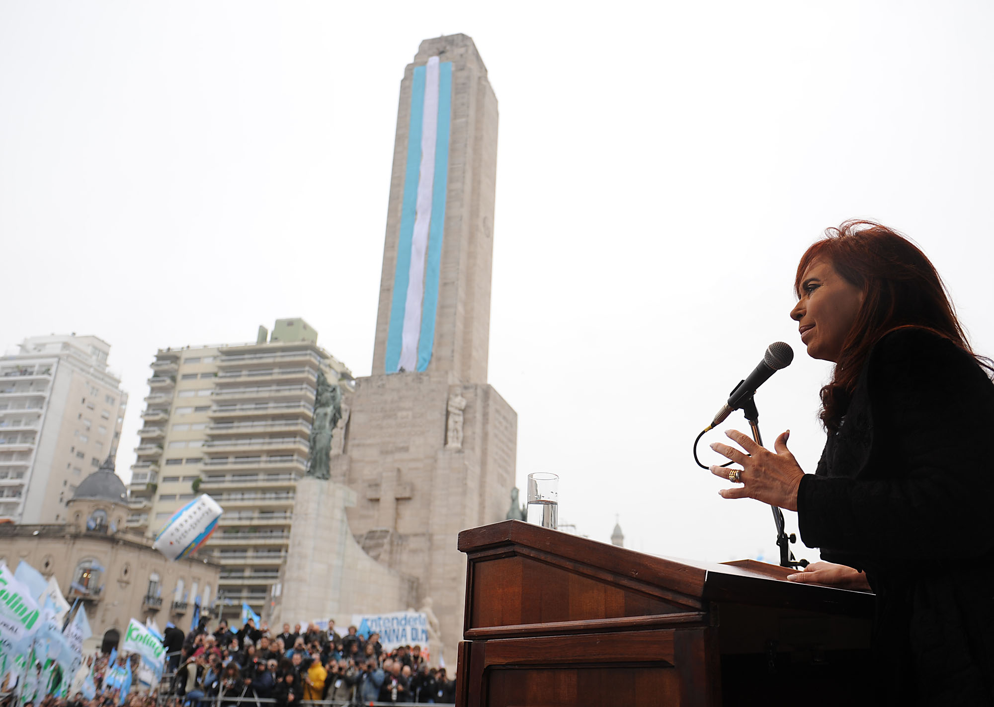 Cristina Fernández de Kirchner en el acto del Día de la Bandera 2011.